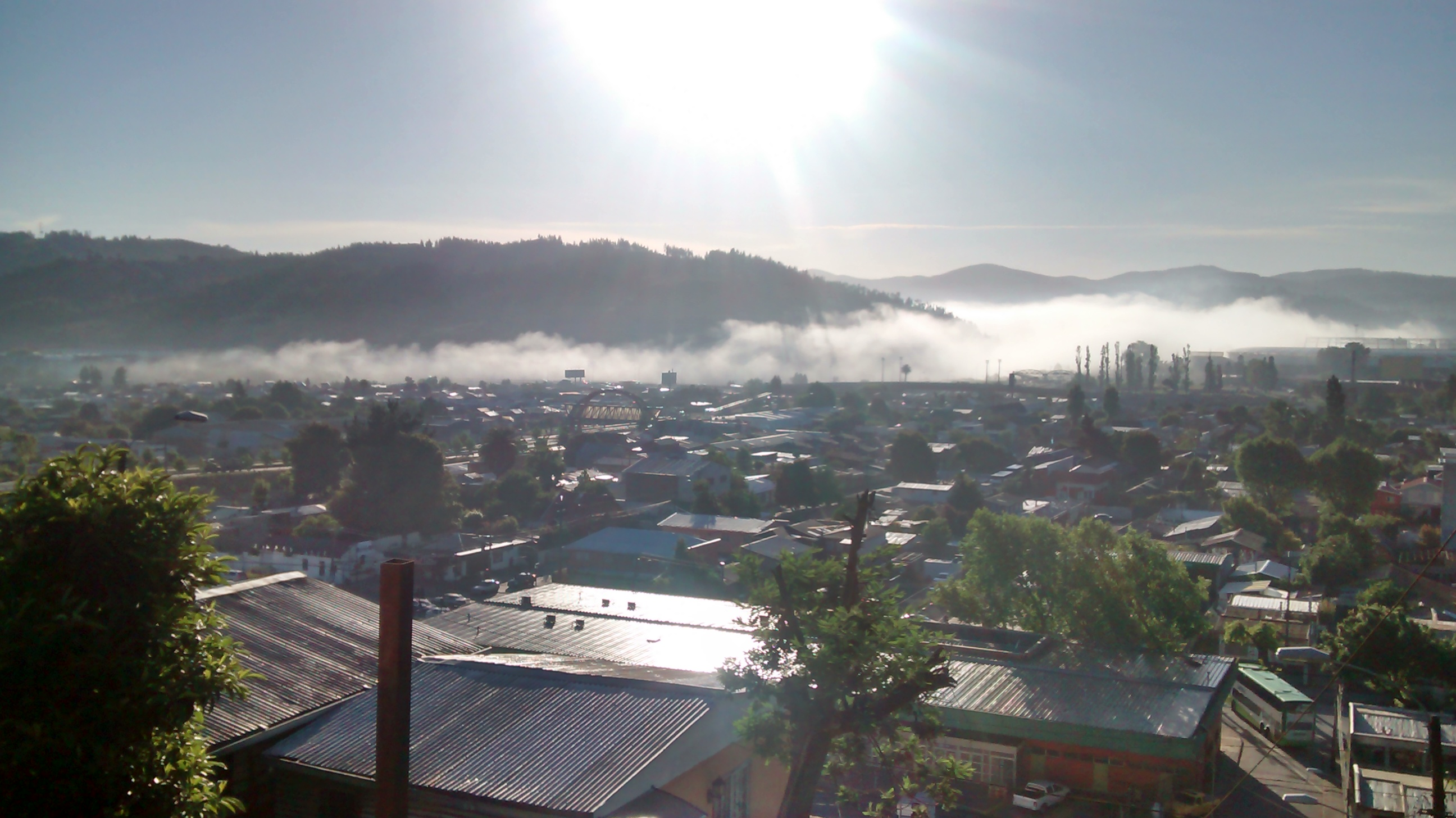 Bruma matinal sobre el río Andalién en primavera, en su paso por la ciudad de Concepción